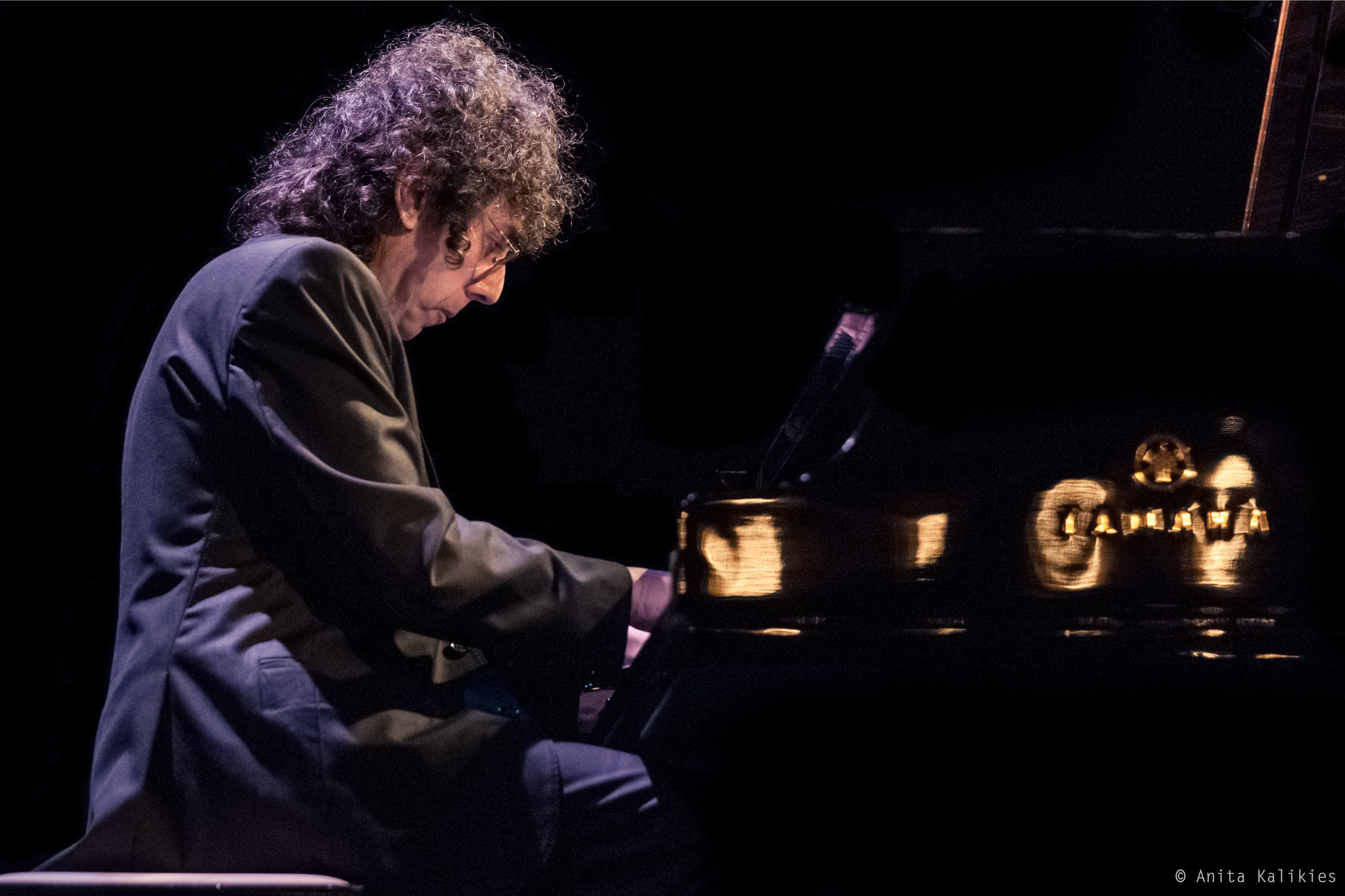 Juan Carlos "Mono" Fontana. Buenos Aires, 20 de marzo de 2015. La Casa de la Cultura del Fondo Nacional de las Artes, es un espacio que conforma su programación convocando a artistas de todo el país, consagrados y emergentes en las distintas disciplinas. En marzo, dentro del ciclo la Otra Música, se presentó Carlos "Mono" Fontana.